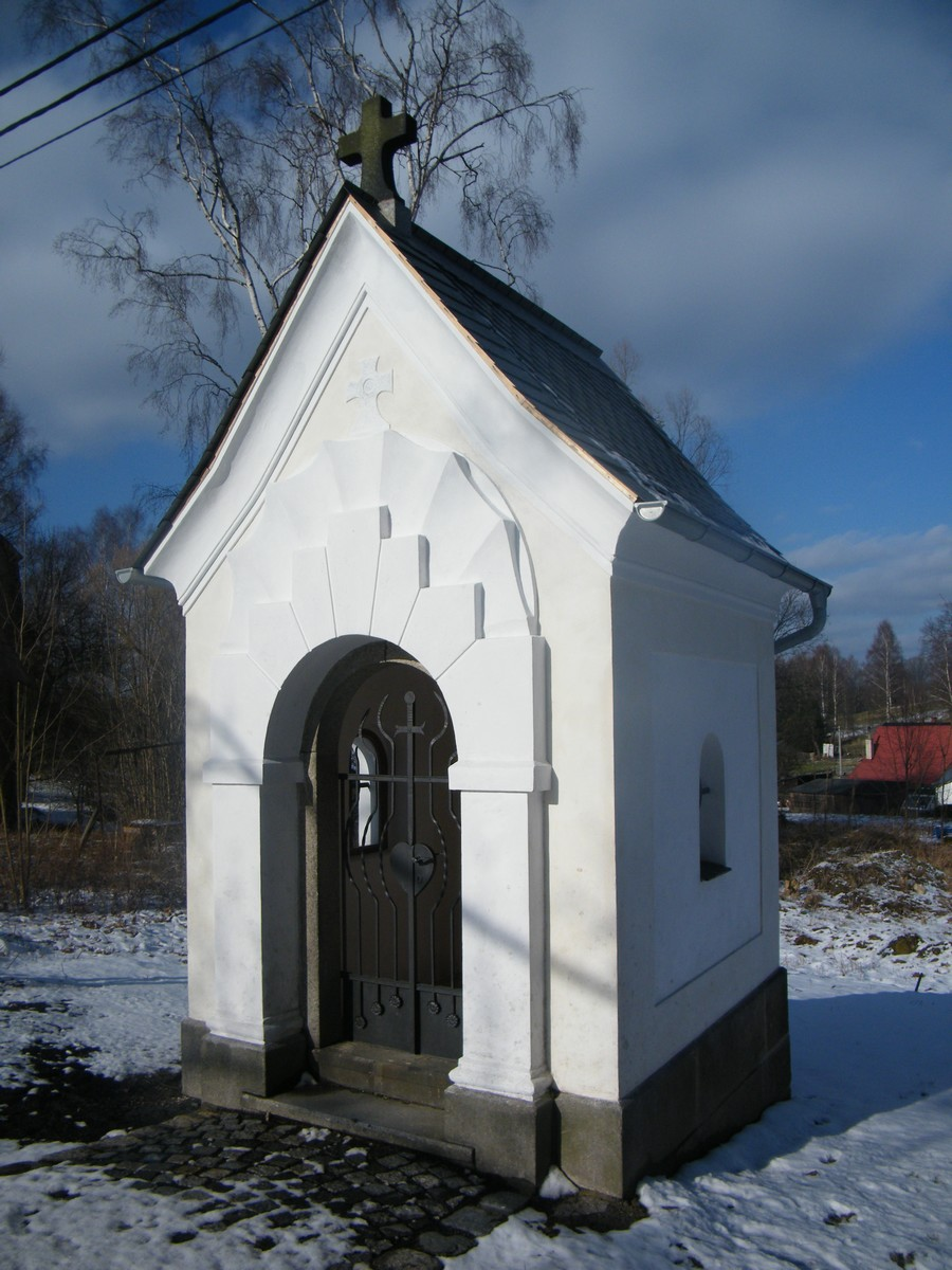 Kaple Panny Marie Bolestné v Království u Šluknova